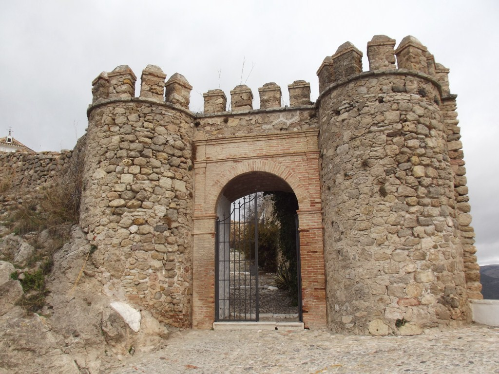 Puerta del Castillo de Fuente Úbeda, Carcabuey (España).